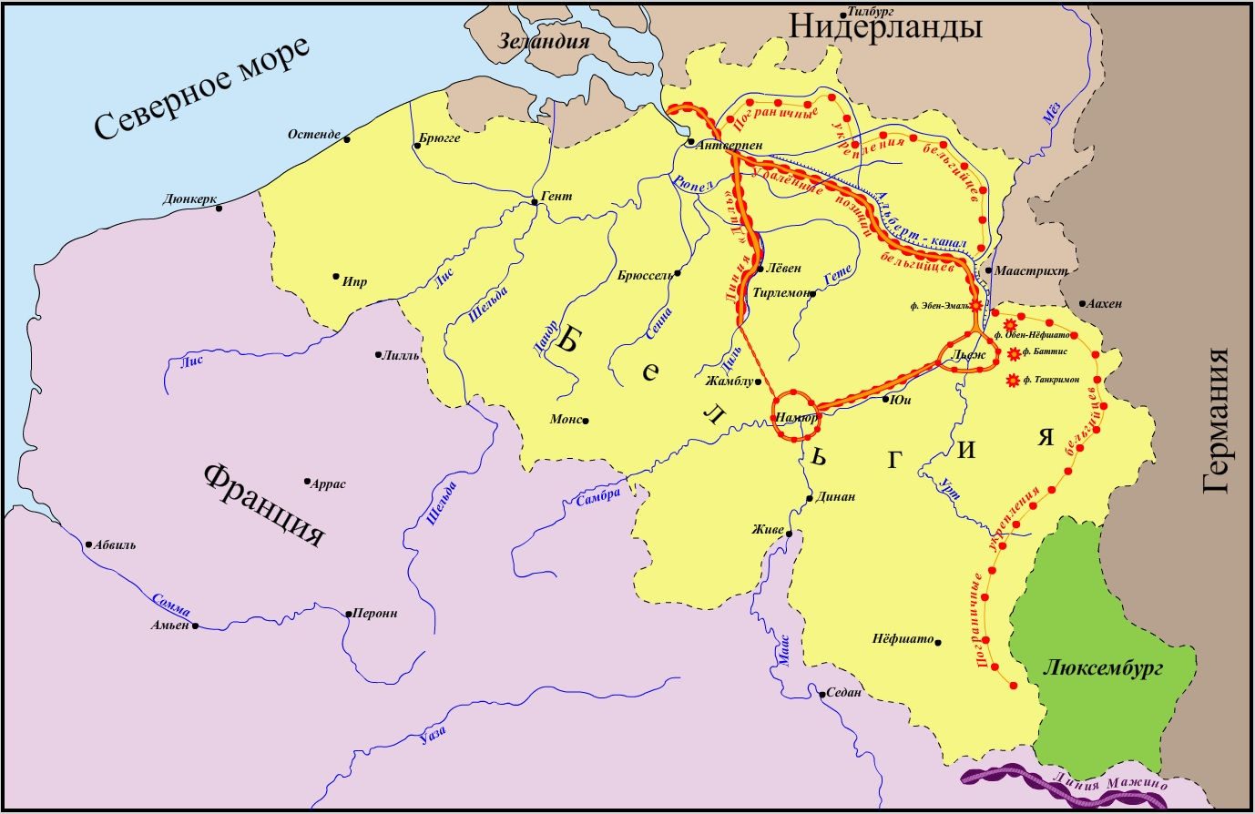 Карта укреплений Бельгии перед началом Бельгийской операции 1940 г.